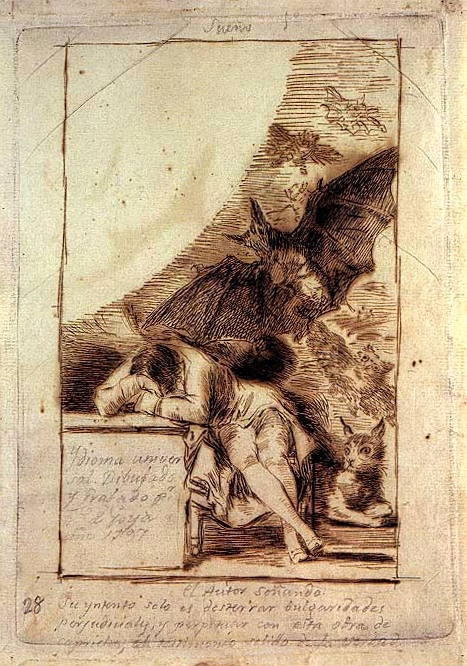 Sueño 1º. (dibujo preparatorio, 1797). Dibujo preparatorio para «El sueño de la razón produce monstruos». Tinta de bugallas a pluma, 23 X 155 mm. Inscripciones: Arriba: «Sueno 1º». En la mesa: «Ydioma universal. Dibujado y Grabado por Fco. de Goya, año 1797.». A pie de imagen: «El autor soñando. Su yntento solo es desterrar bulgaridades perjudiciales, y perpetuar con esta obra de caprichos, el testimonio solido de la verdad.»